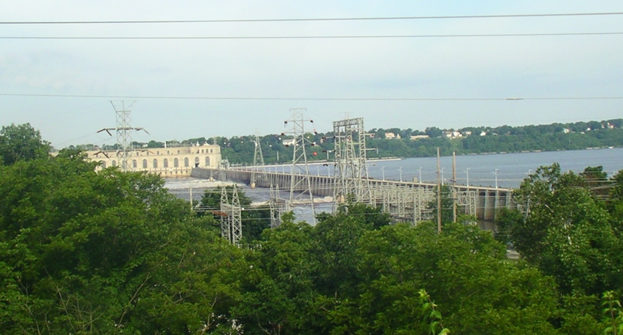 Staudamm, Schleuse und Kraftwerk in Keokuk, Iowa